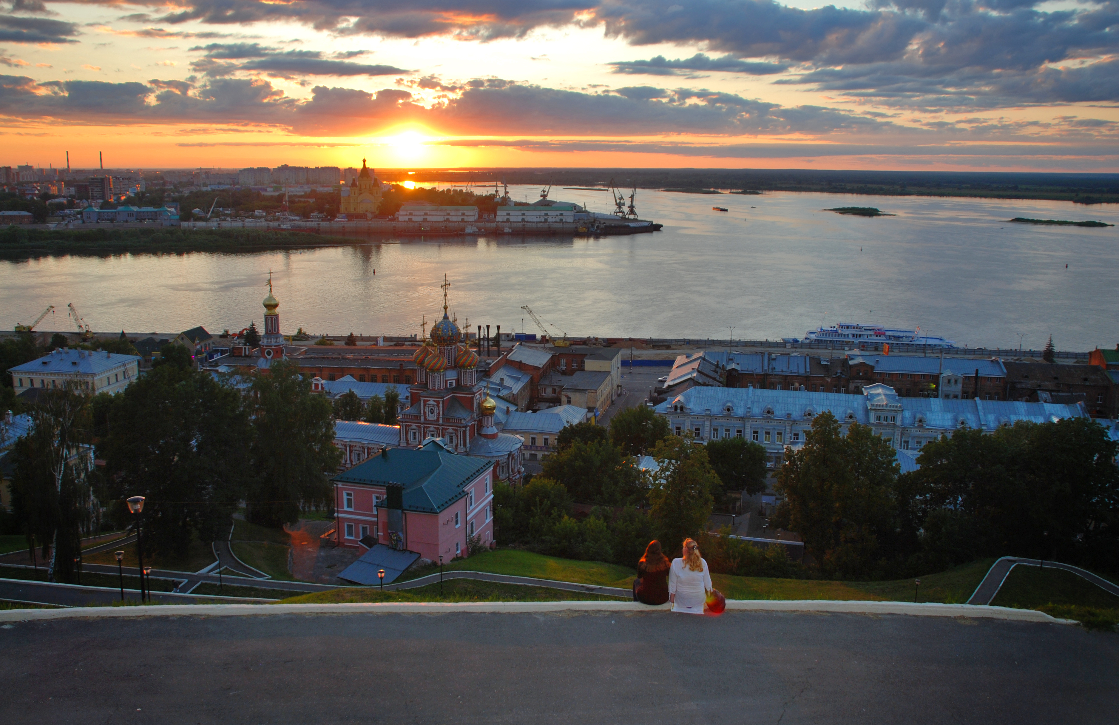 Ансамбль церкви Рождества Богородицы (Нижегородская область, Нижний Новгород, улица Рождественская(бывш.Маяковского), 34, Суетинская улица, 23)